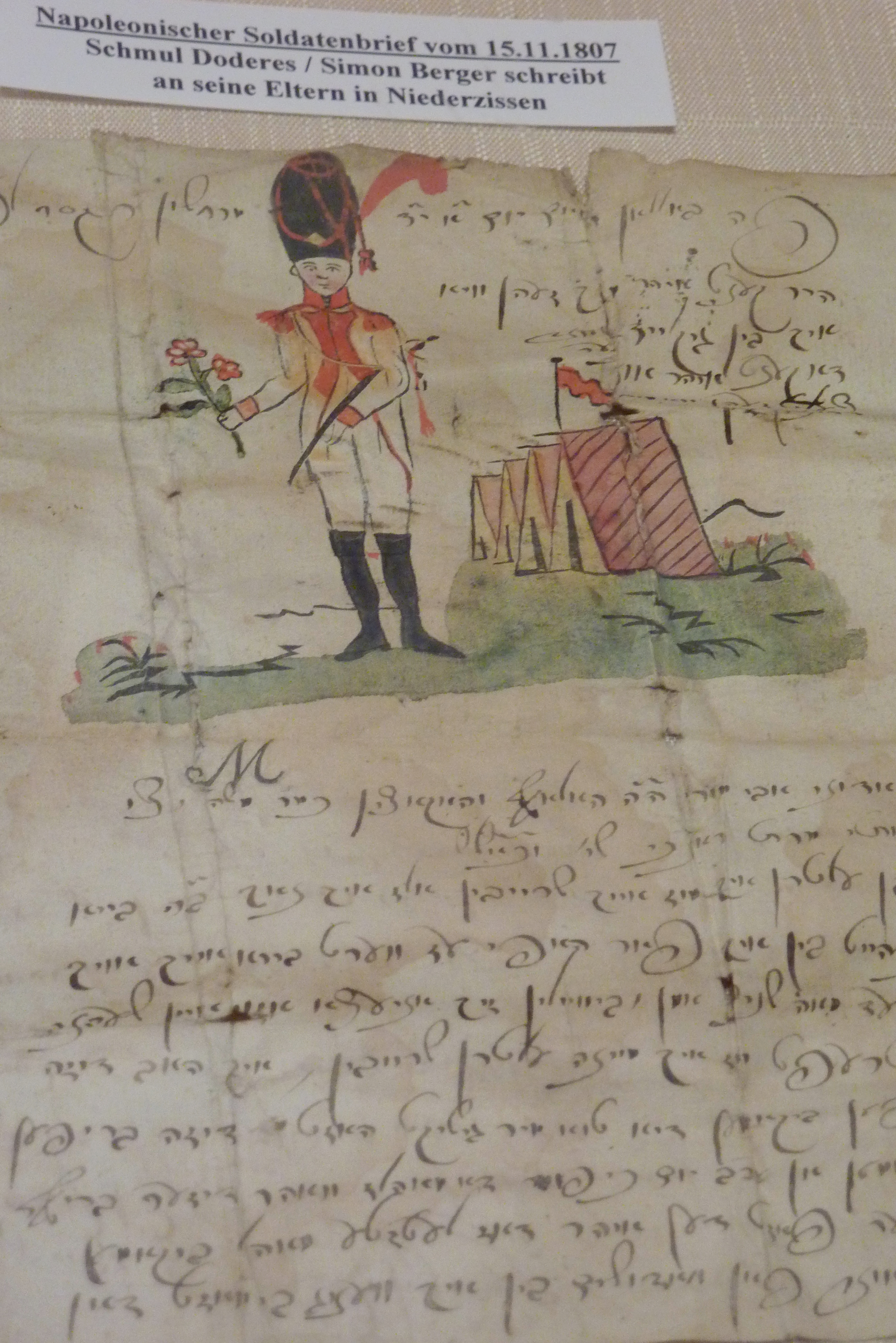 Genisa Niederzissen, Ausstellung in der ehemaligen Synagoge in Niederzissen im Landkreis Ahrweiler (Rheinland-Pfalz), Brief eines Soldaten vom 15. November 1807